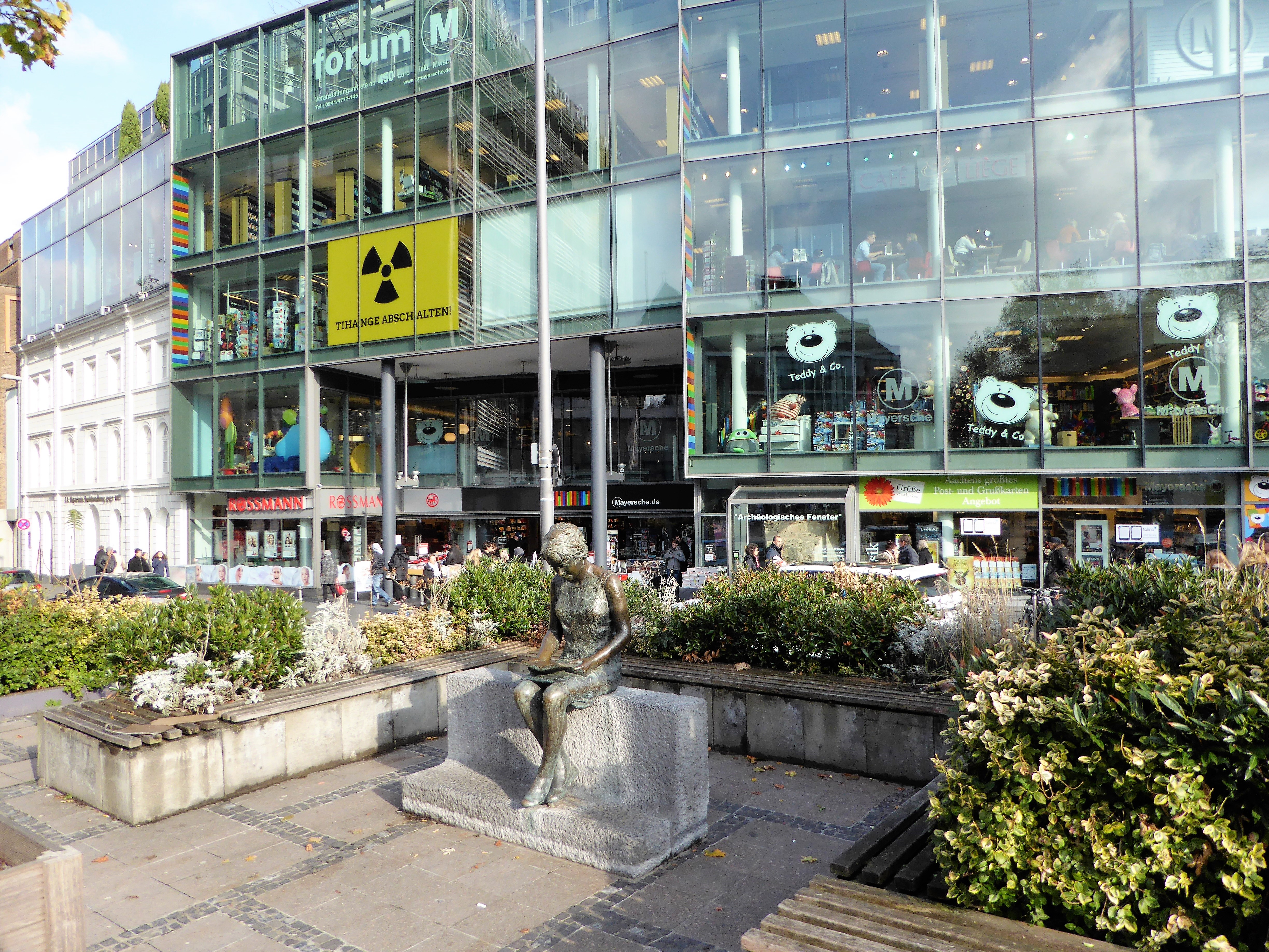 Protest gegen Atomkraftwerk Tihange in Aachen